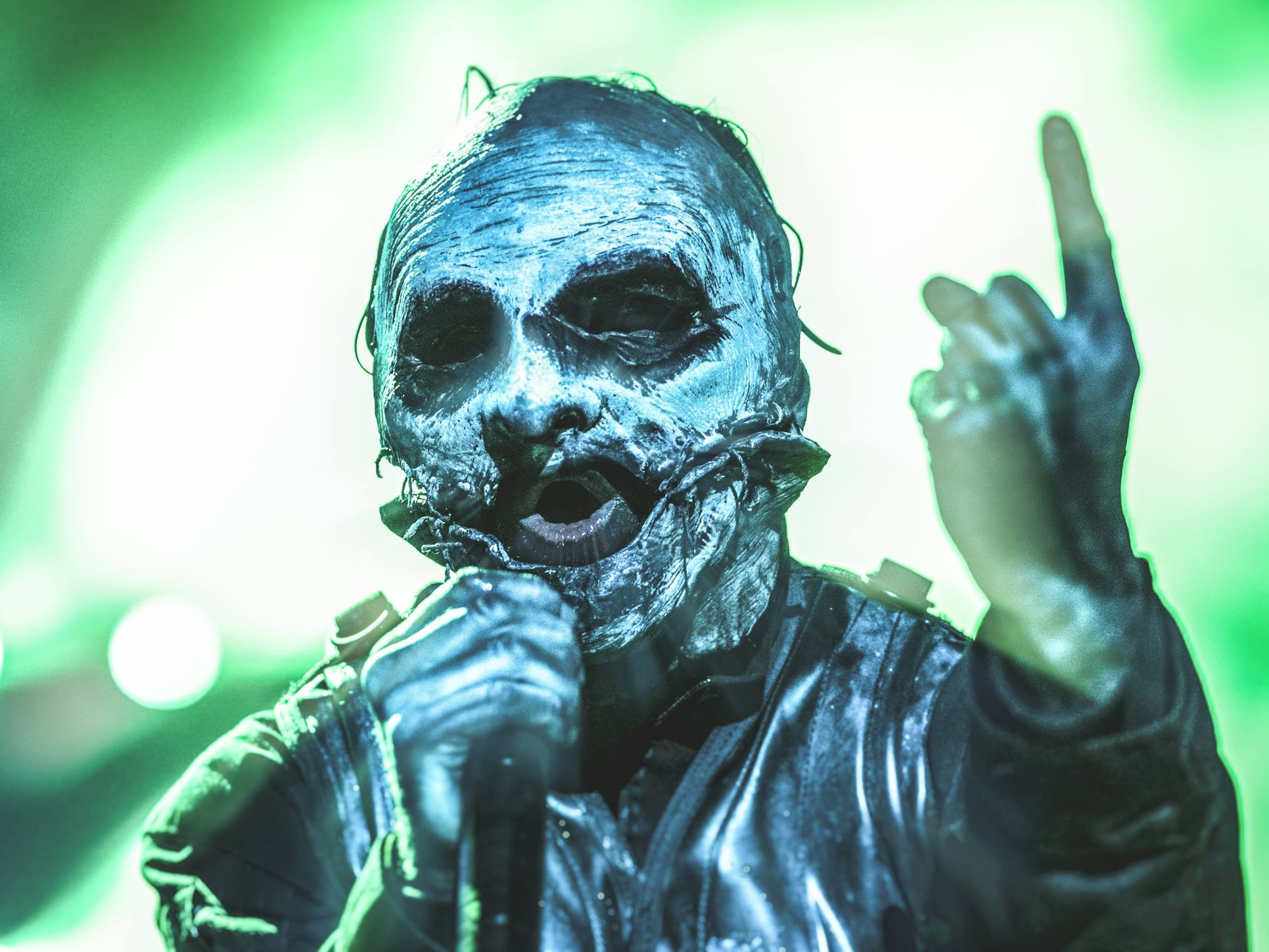 Metalová kapela